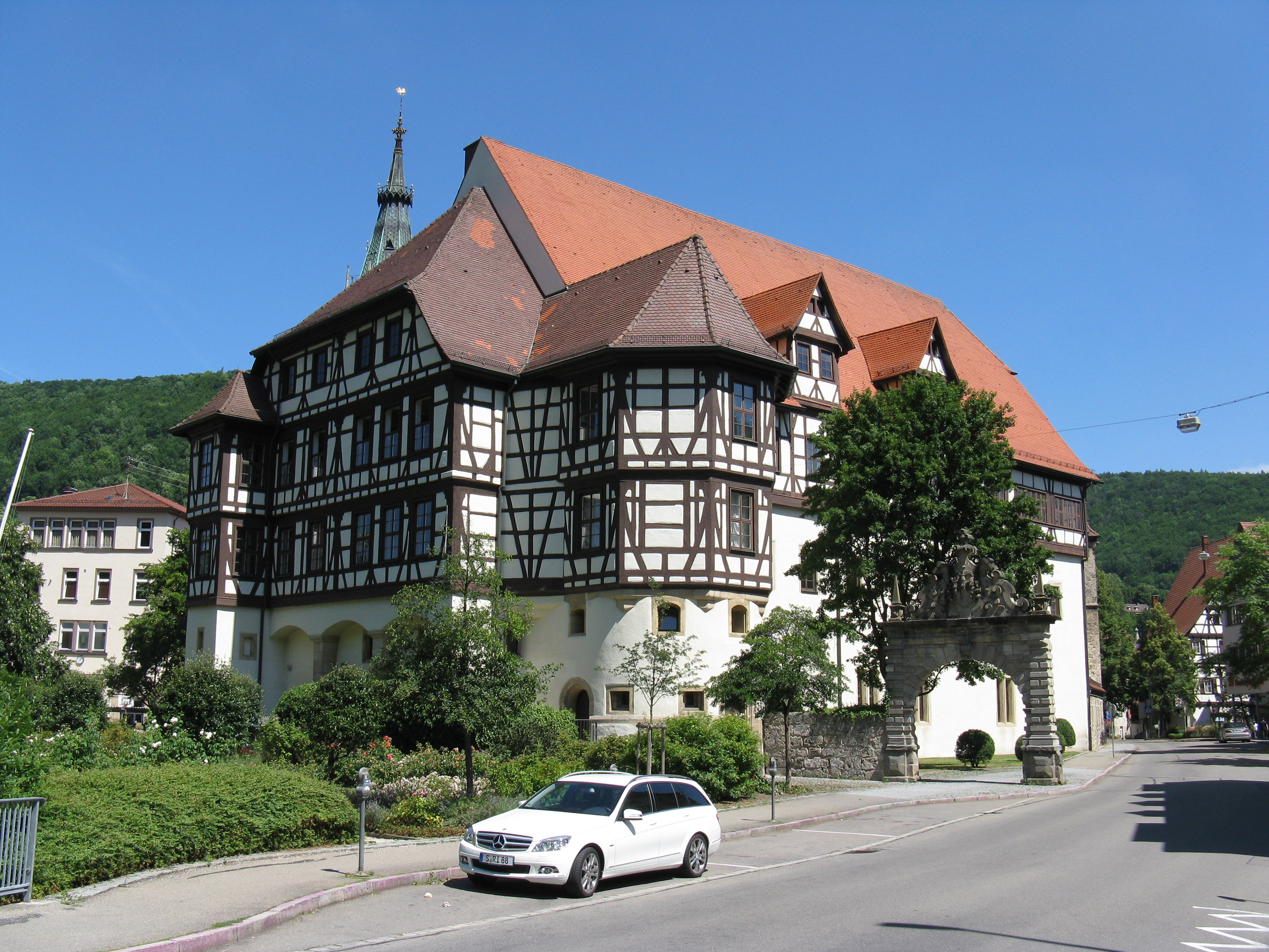 Schloß Urach in Bad Urach (Baden-Württemberg)